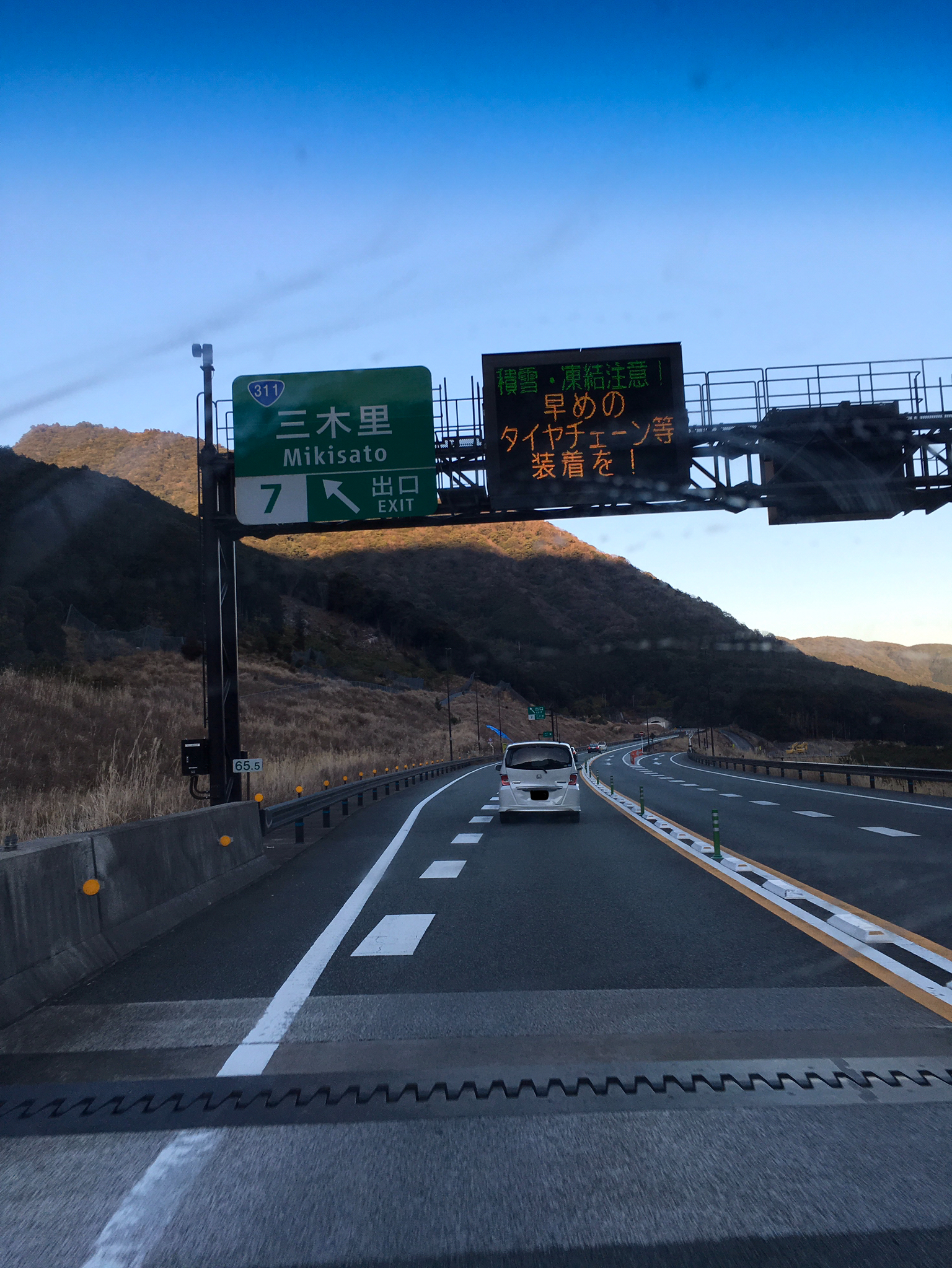 三重県尾鷲市三木里IC